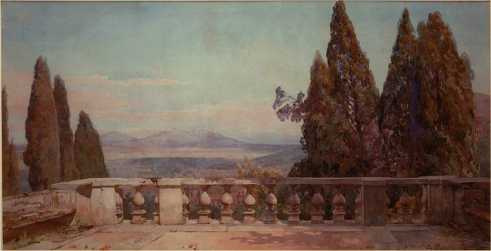 Terrazza superiore di Villa d'Este sovrastante Via del Colle e un gruppo di cipressi. A destra sullo sfondo il campanile del Duomo. Acquarello di cm 38 x 74.